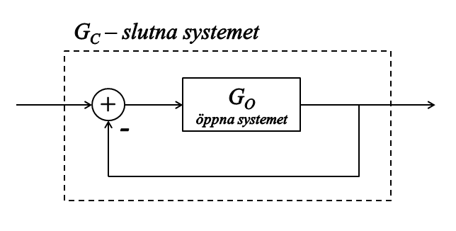 Blockschema med ett återkopplat system